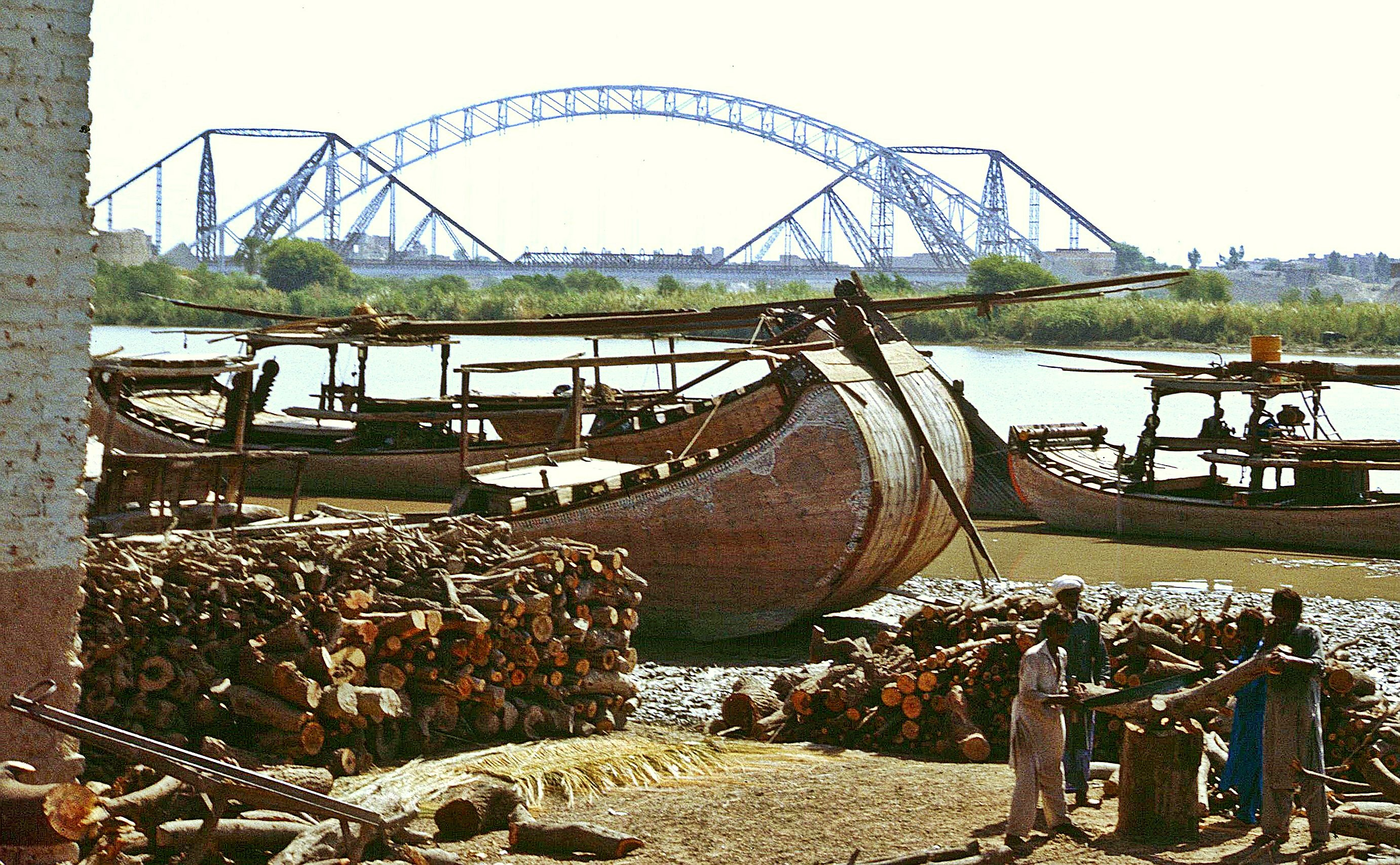 Sukkur: Holzverladung am Indusufer